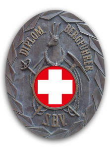 Bergführerabzeichen Schweiz